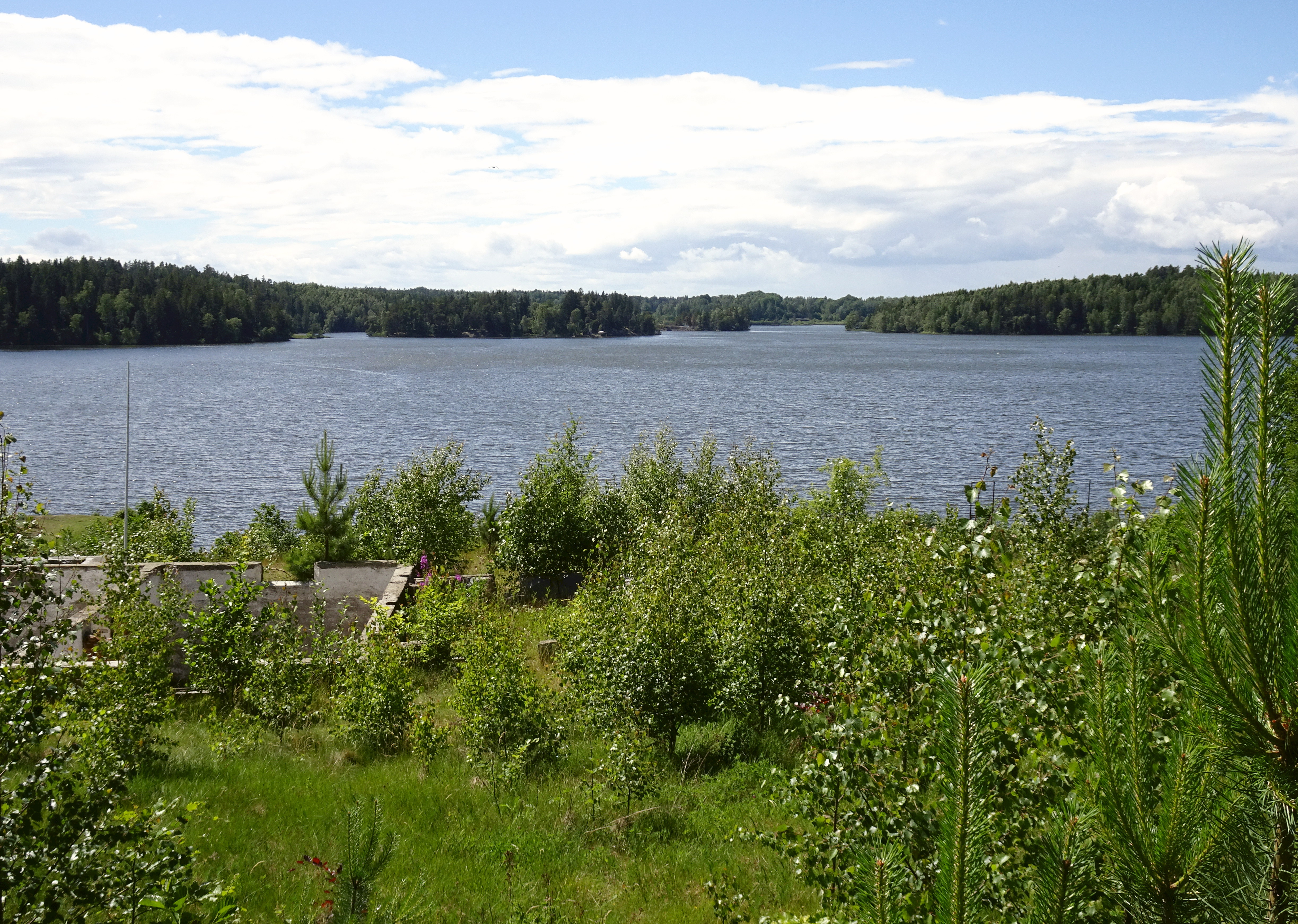 Sjön Måsnaren, Södertälje kommun, vy söderut från Hovsjö